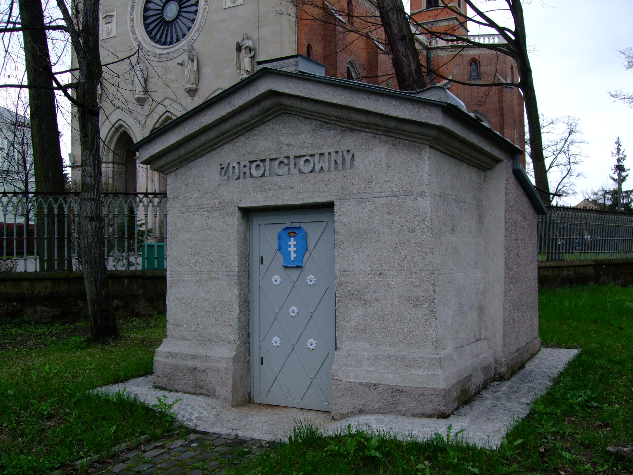 Źródło Główne; główne źródło wody siarczanej w Krzeszowicach.